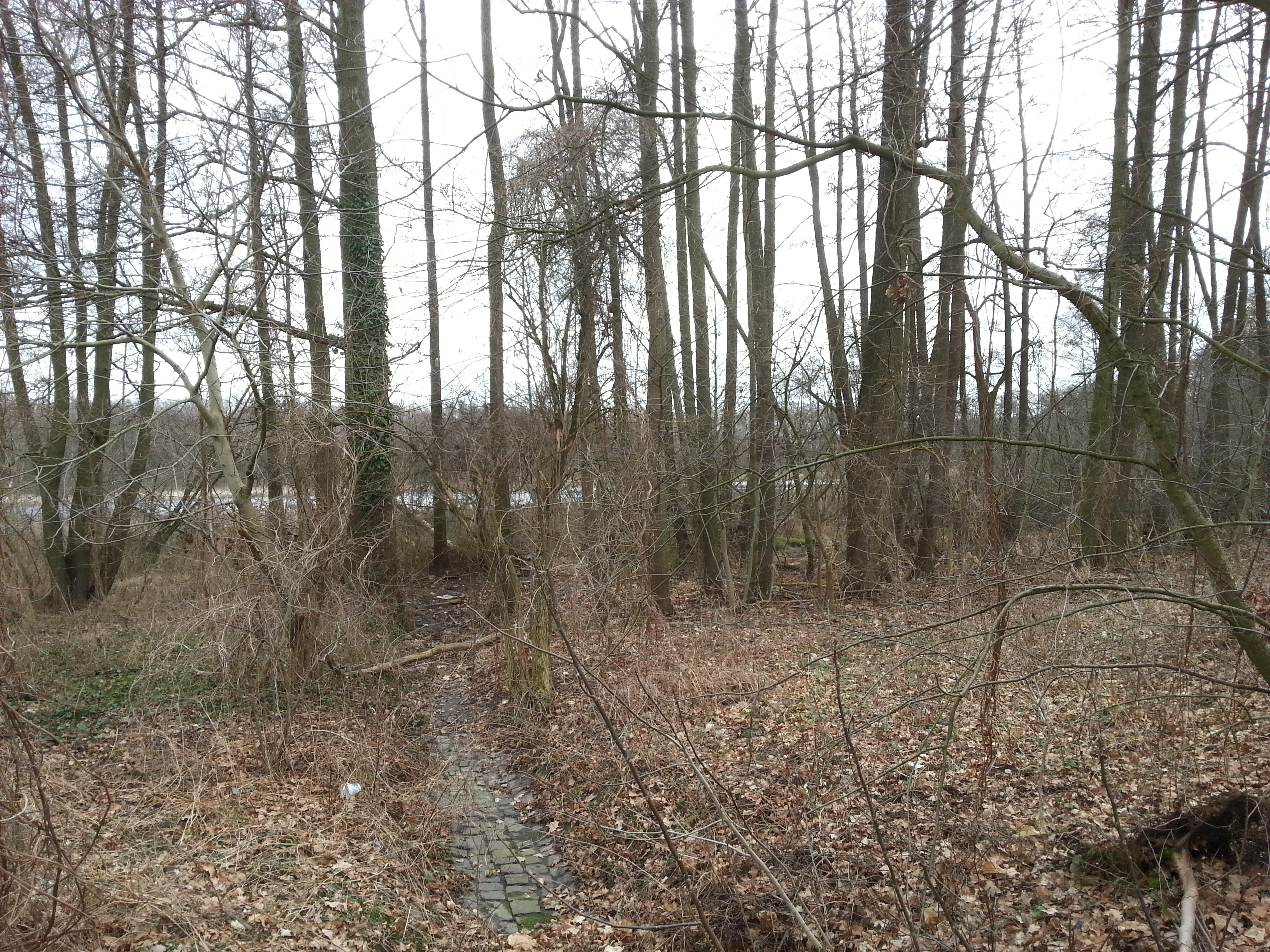 Der Krebssee in Königs Wusterhausen, Teil des Naturschutzgebietes Tiergarten, von der Fichtestraße aus gesehen.